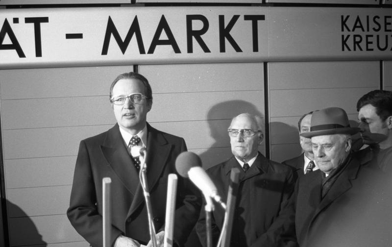 Staatssekretär Heinz Ruhnau eröffnet die erste Teilstrecke der Bonner Stadtbahn auf dem unterirdischen Haltepunkt "Universität/Markt"